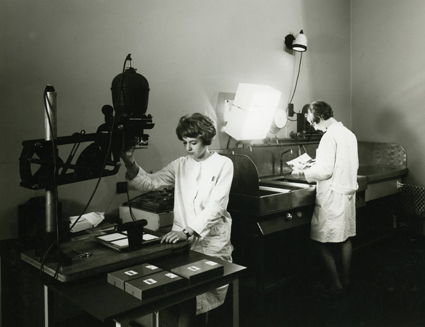 Kleine donkere Kamer 1964